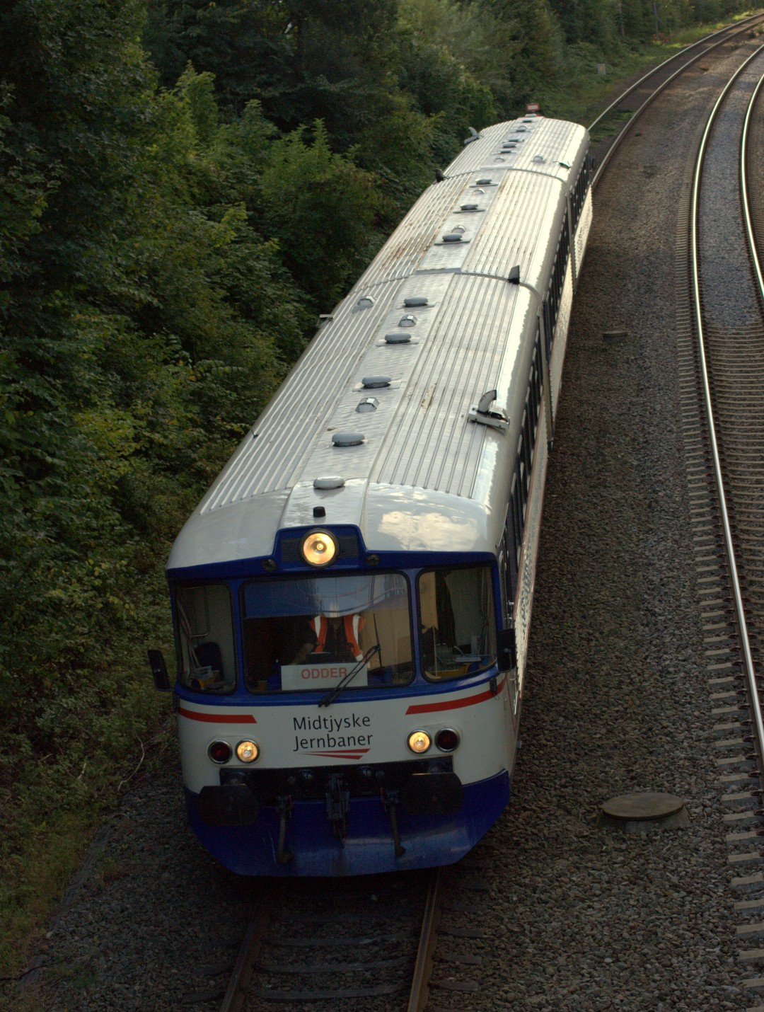 Odderbanen ved Kongsvang i Århus.